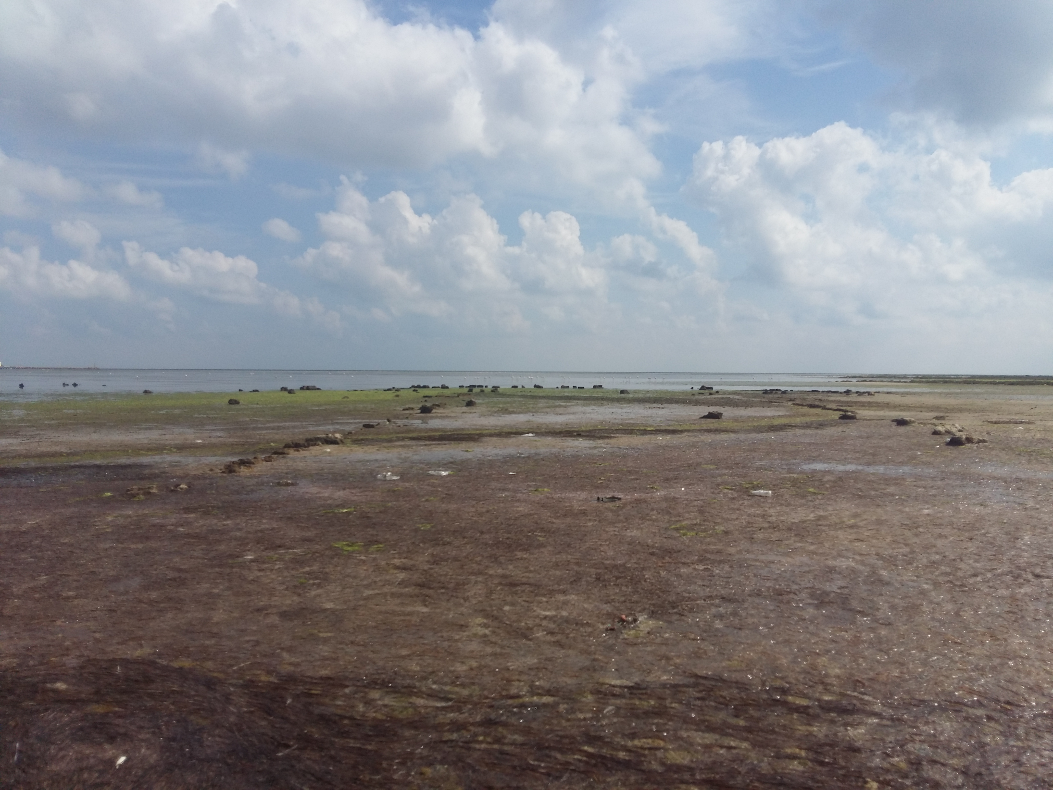 Golfe de Boughrara